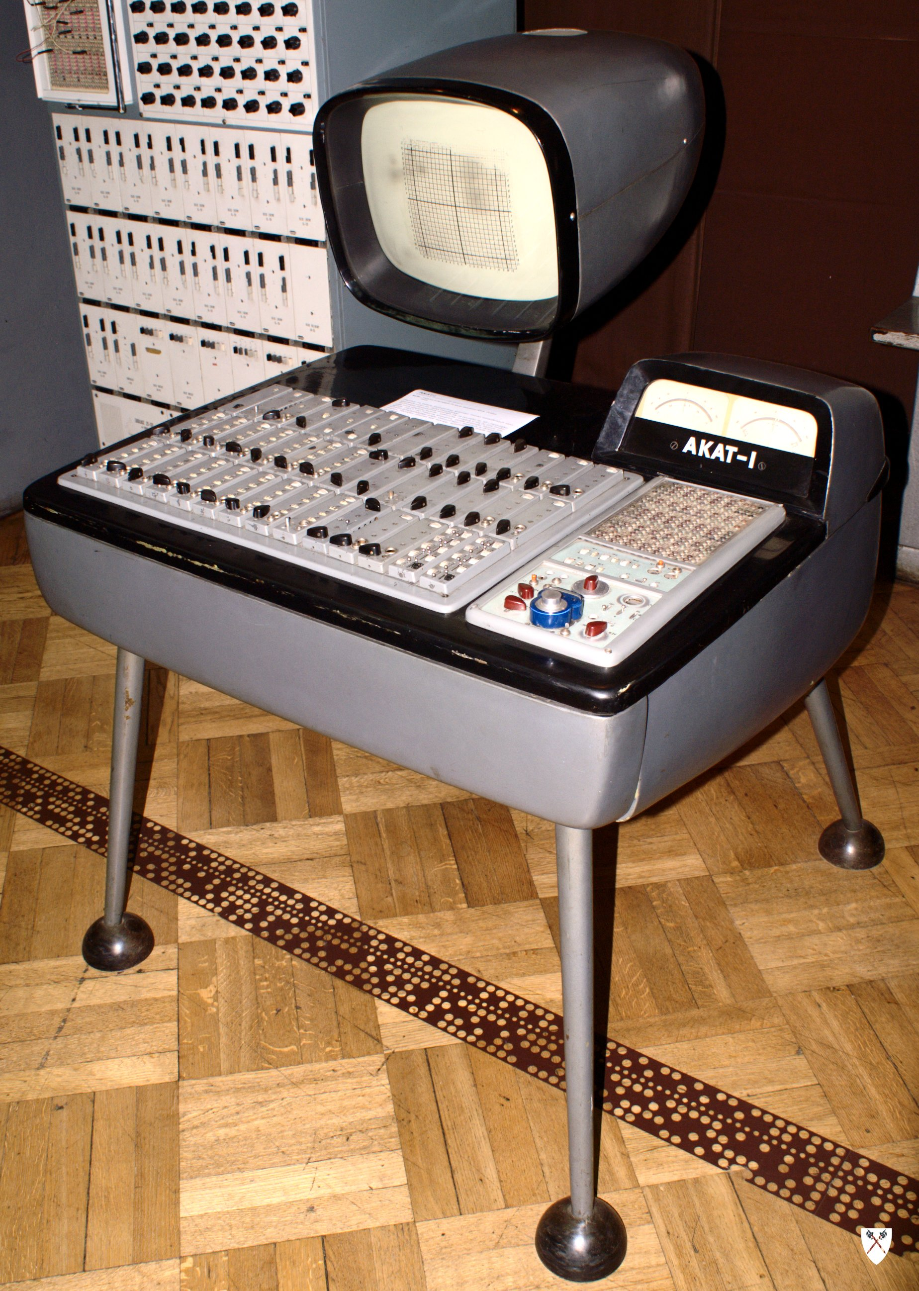 AKAT-1 - pierwszy na świecie komputer analogowy zbudowany na tranzystorach